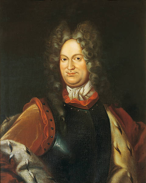 Ludwig Friedrich I. von Schwarzburg-Rudolstadt (1667-1718)